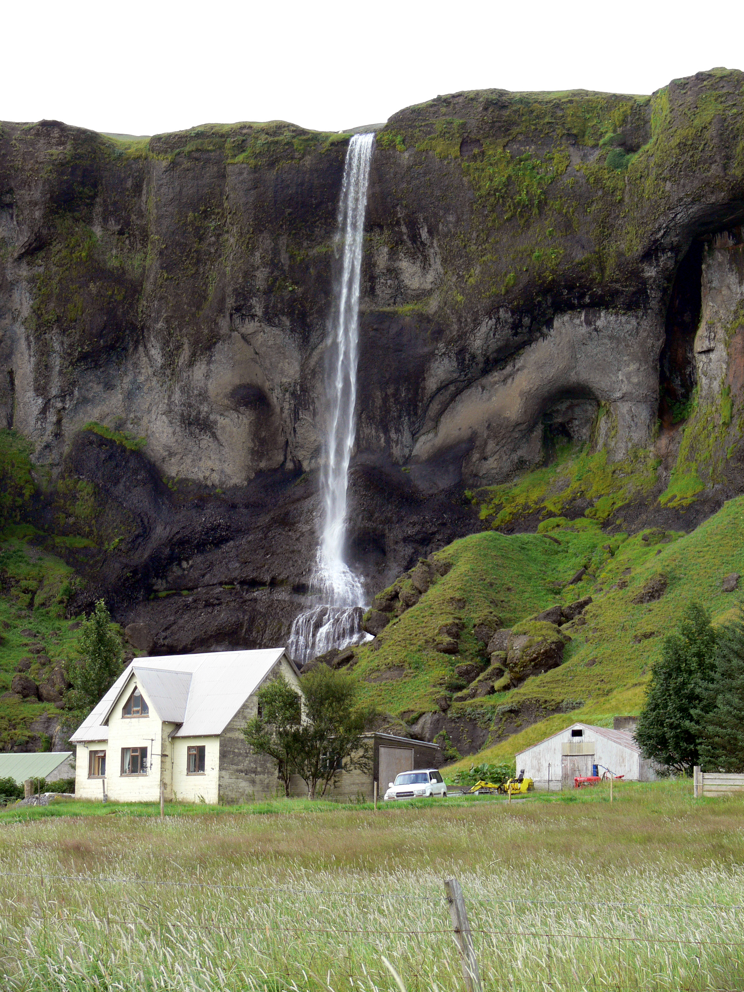 Fossá á Síðum